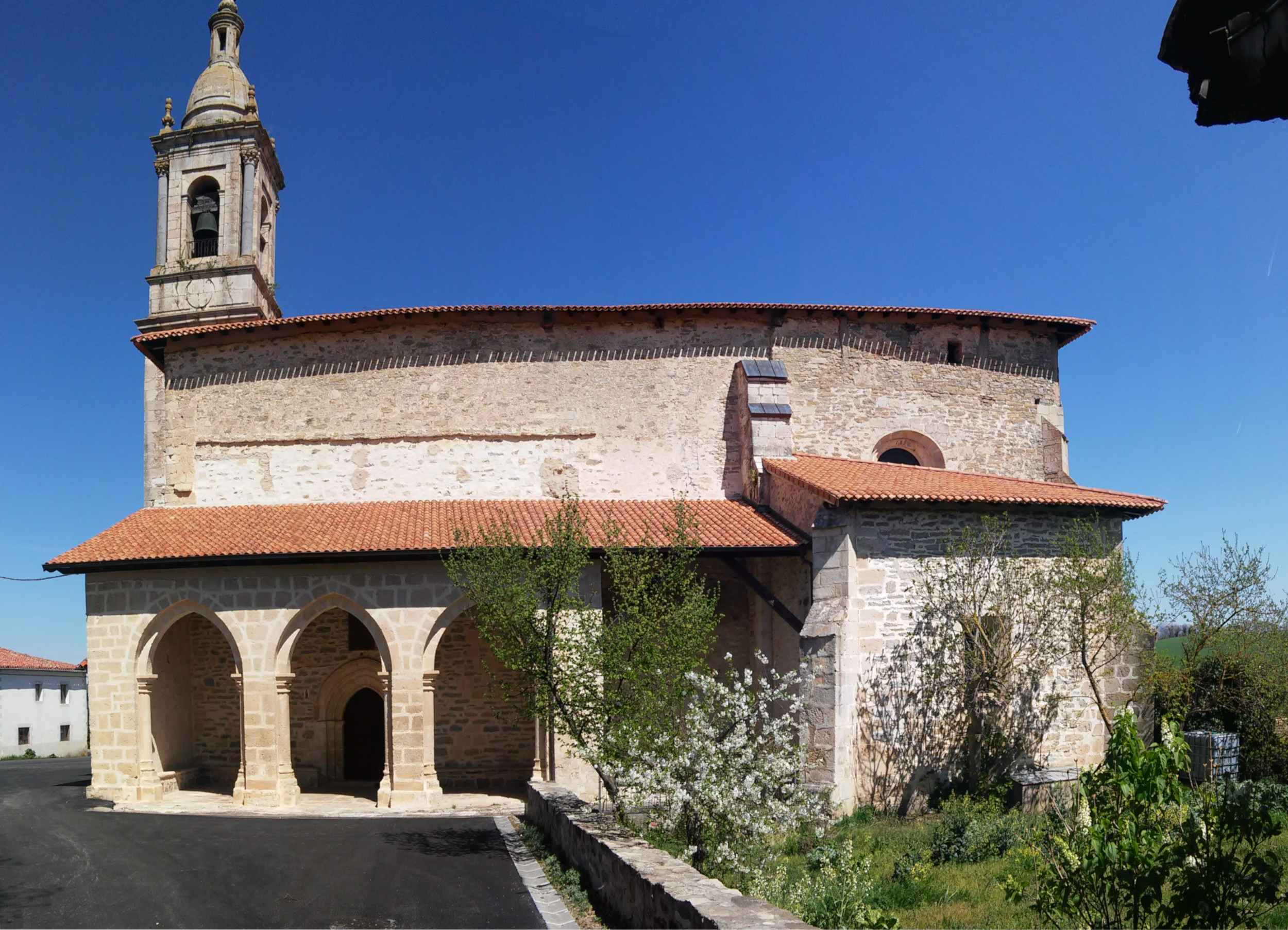 Adanako eliza